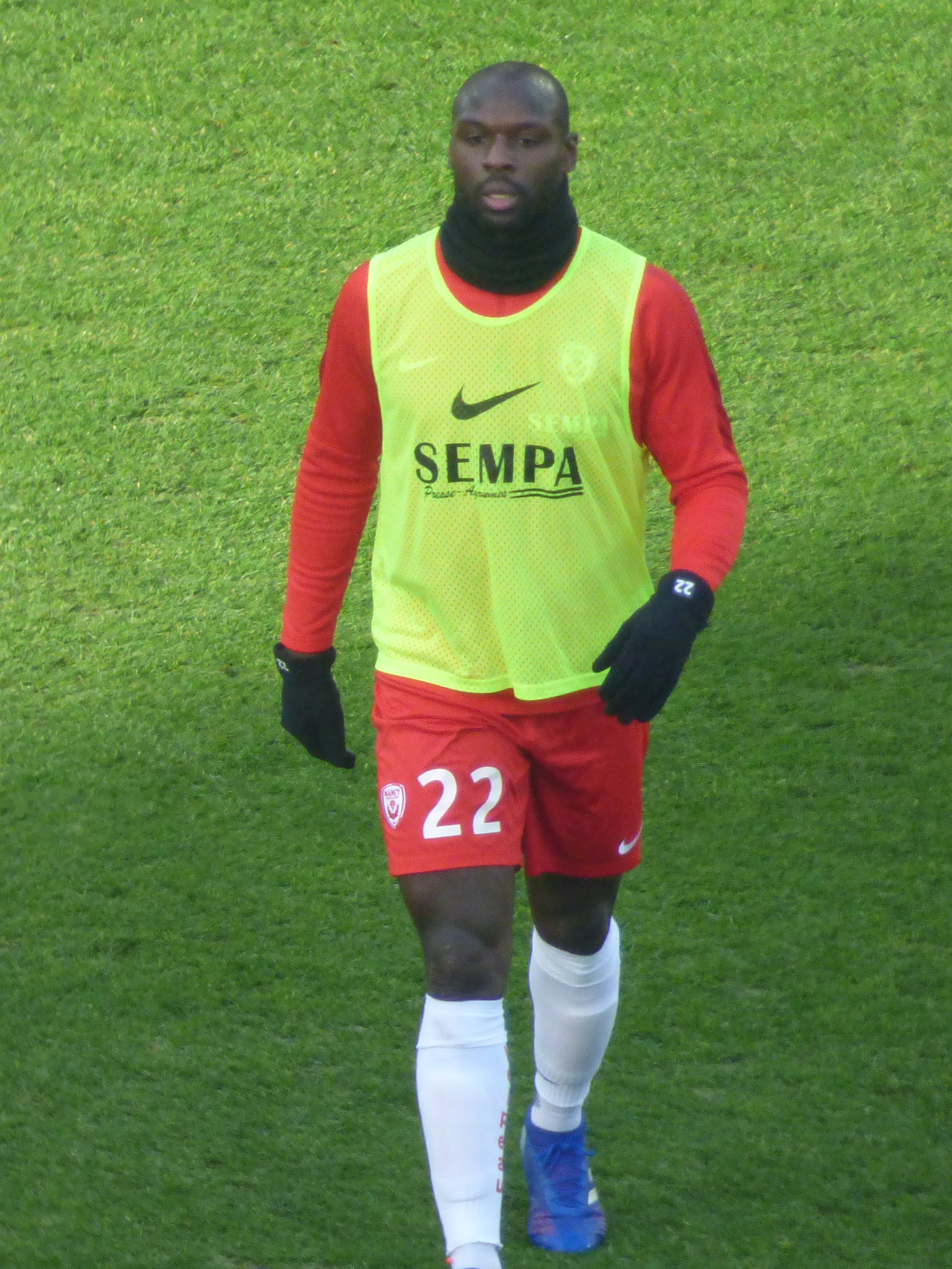 Ernest Seka avant le match RC Lens / AS Nancy-Lorraine, comptant pour la vingt-et-unième journée du championnat de France de football de Ligue 2 2018-2019, le 19 janvier 2019, au Stade Bollaert-Delelis de Lens.